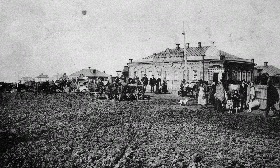 Станція Гришино 1900 роки